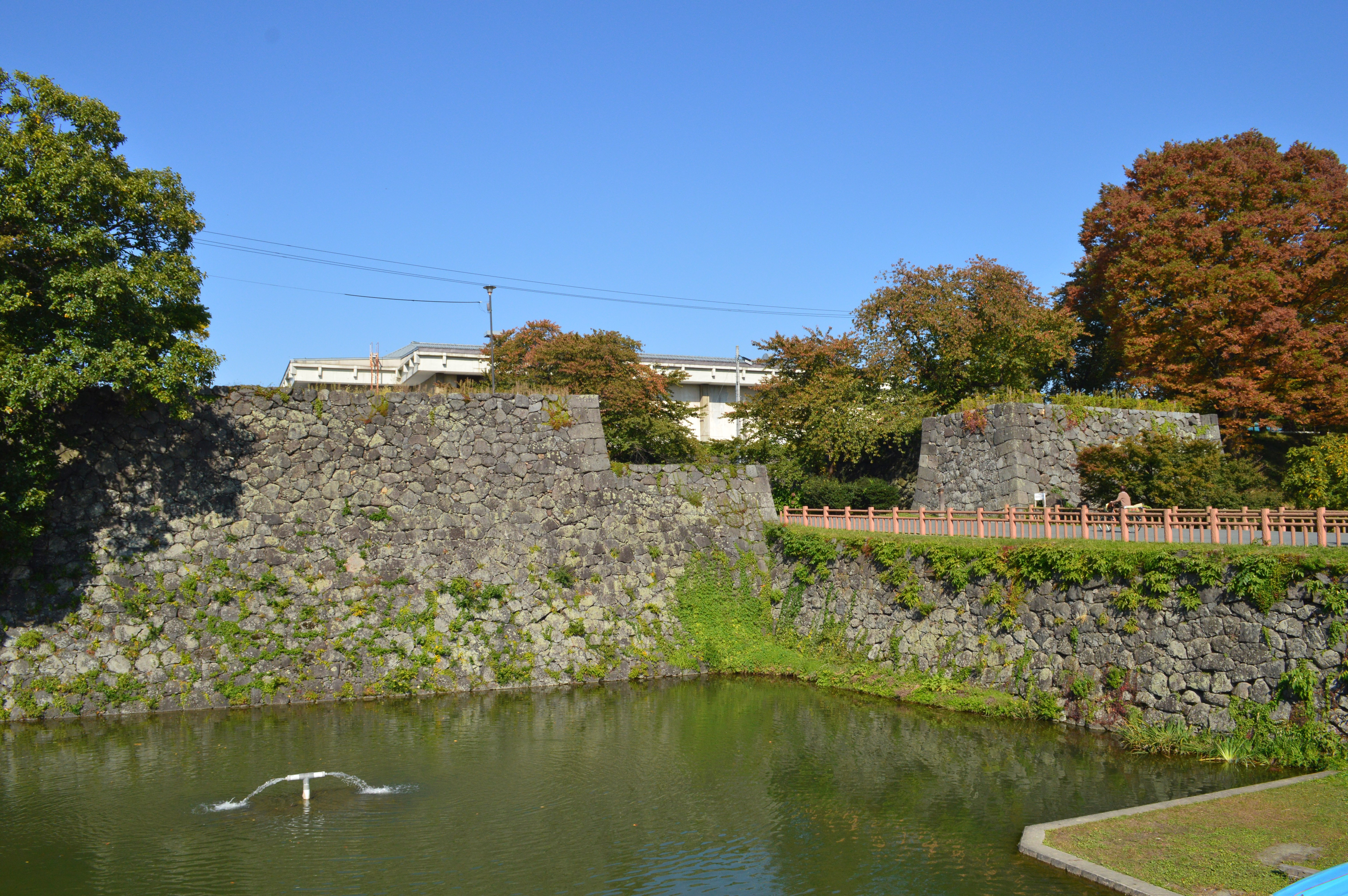 山形城 二の丸南門